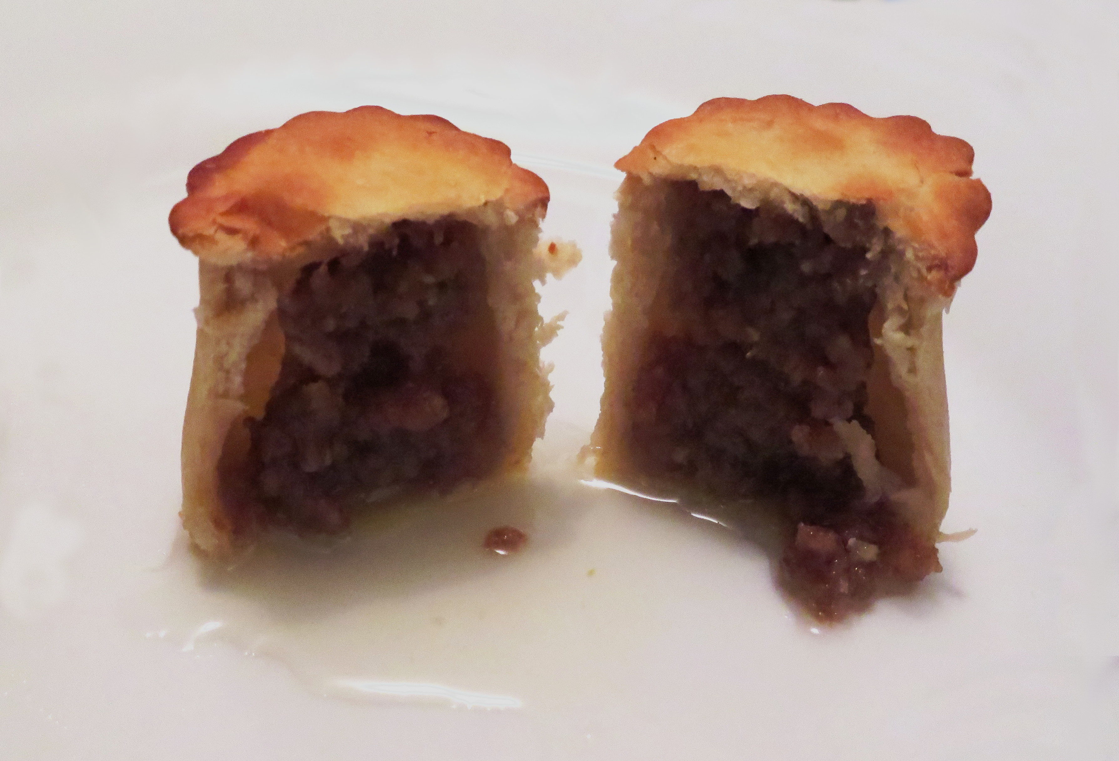 Petit pâté de Pézenas en coupe.